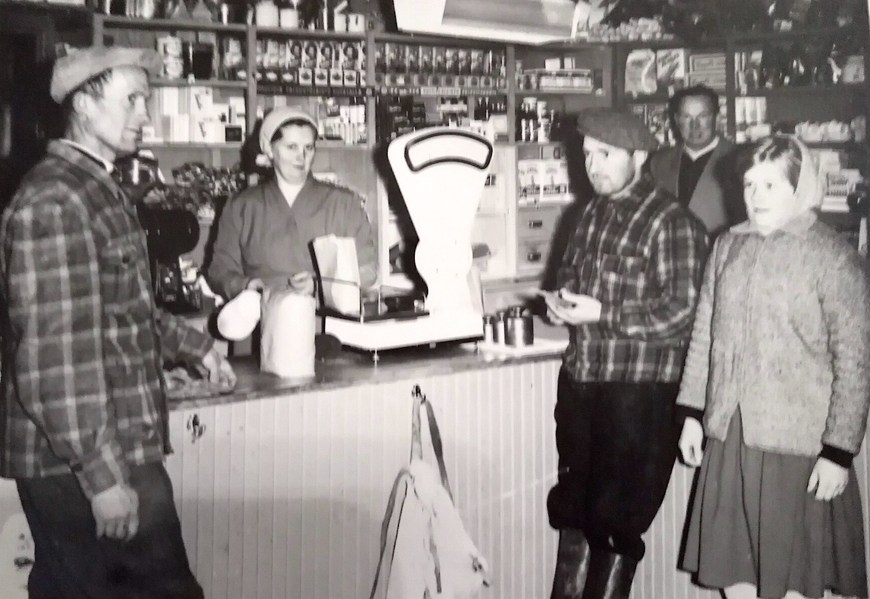 Satakunnan Kansan lehtikuva 1957